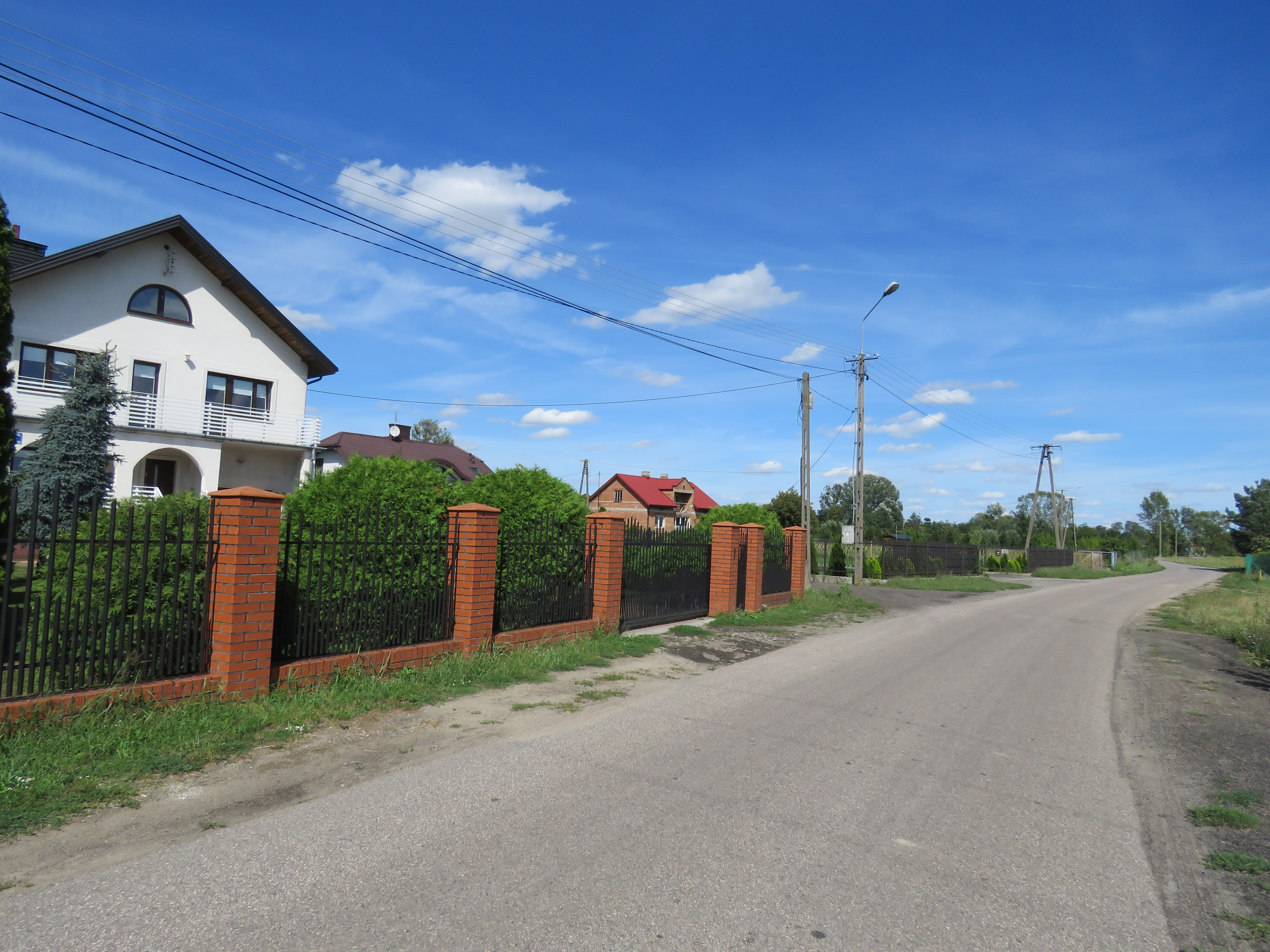 MAŁA WIEŚ PRZY DRODZE